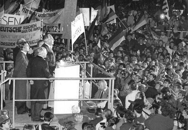 Dresden, Besuch Kohl, Rede auf Altmarkt ADN-ZB Mittelstädt 19.12.89 Dresden: Kohl-Besuch- Nach Abschluß des Arbeitstreffens der Regierungschefs beider deutscher Staaten zeigte sich Bundeskanzler Dr. Helmut Kohl in einer Ansprache auf dem Neumarkt, vor der Ruine der Frauenkirche, an tausende Dresdner. Abgebildete Personen: Kohl, Helmut: Bundeskanzler, Ministerpräsident von Rheinland-Pfalz, CDU, Bundesrepublik Deutschland (GND 118564595)